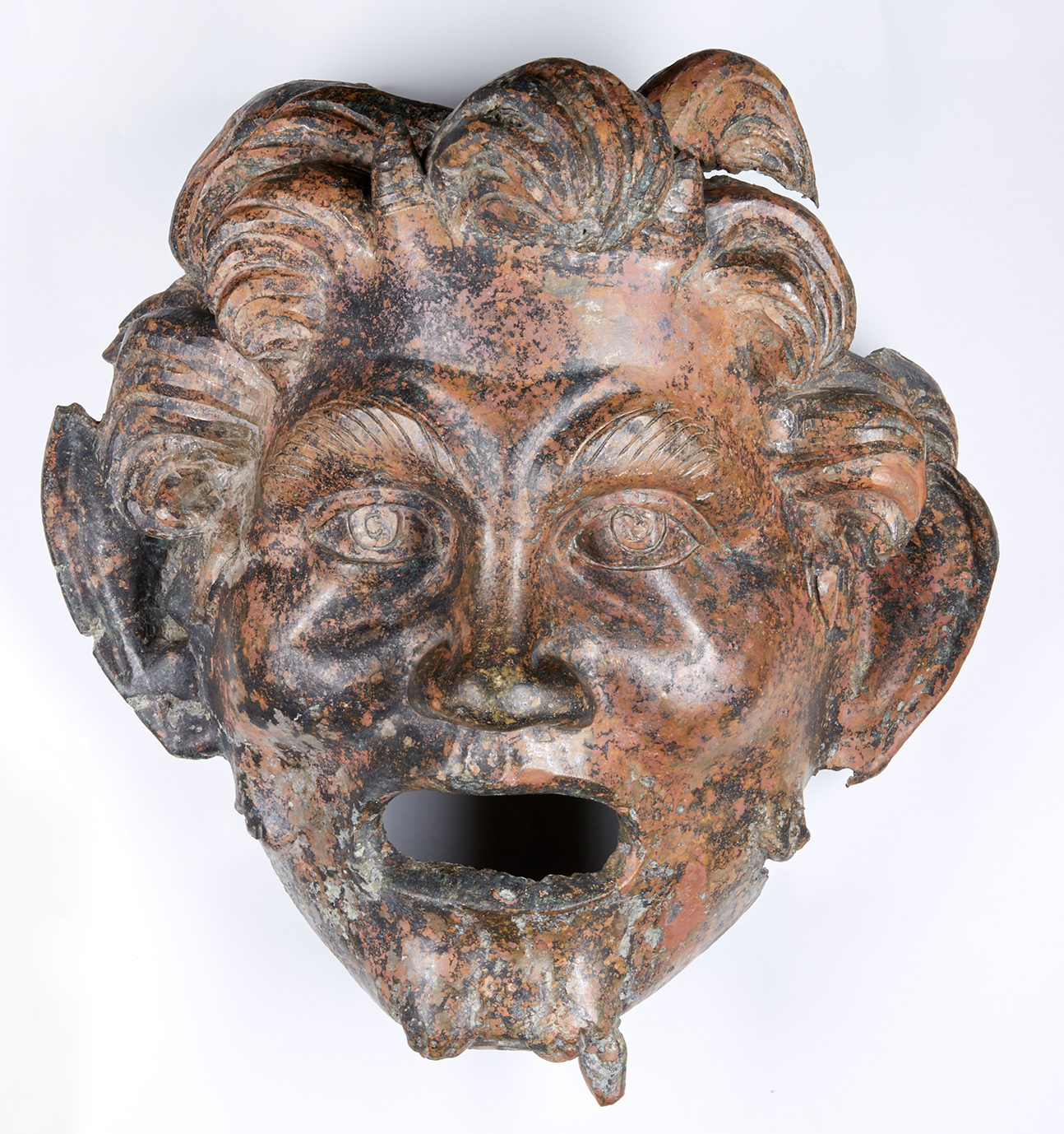 מיכאל אייזנברג ראש משלחת החפירות הארכאולוגיות של אוניברסיטת חיפה בסוסיתא מחזיק את מסכת הברונזה של האל פאן לאחר מציאתה על הכתף המוביל מההר לרכס עליו נמצאת העיר סוסיתא המסכה בתום הניקוי המכני. שלב ראשון של תהליך השימור שנעשה בידי ד"ר אלכסנדר ירמולין, מנהל מעבדת השימור במכון לארכאולוגיה, אונ' חיפה.